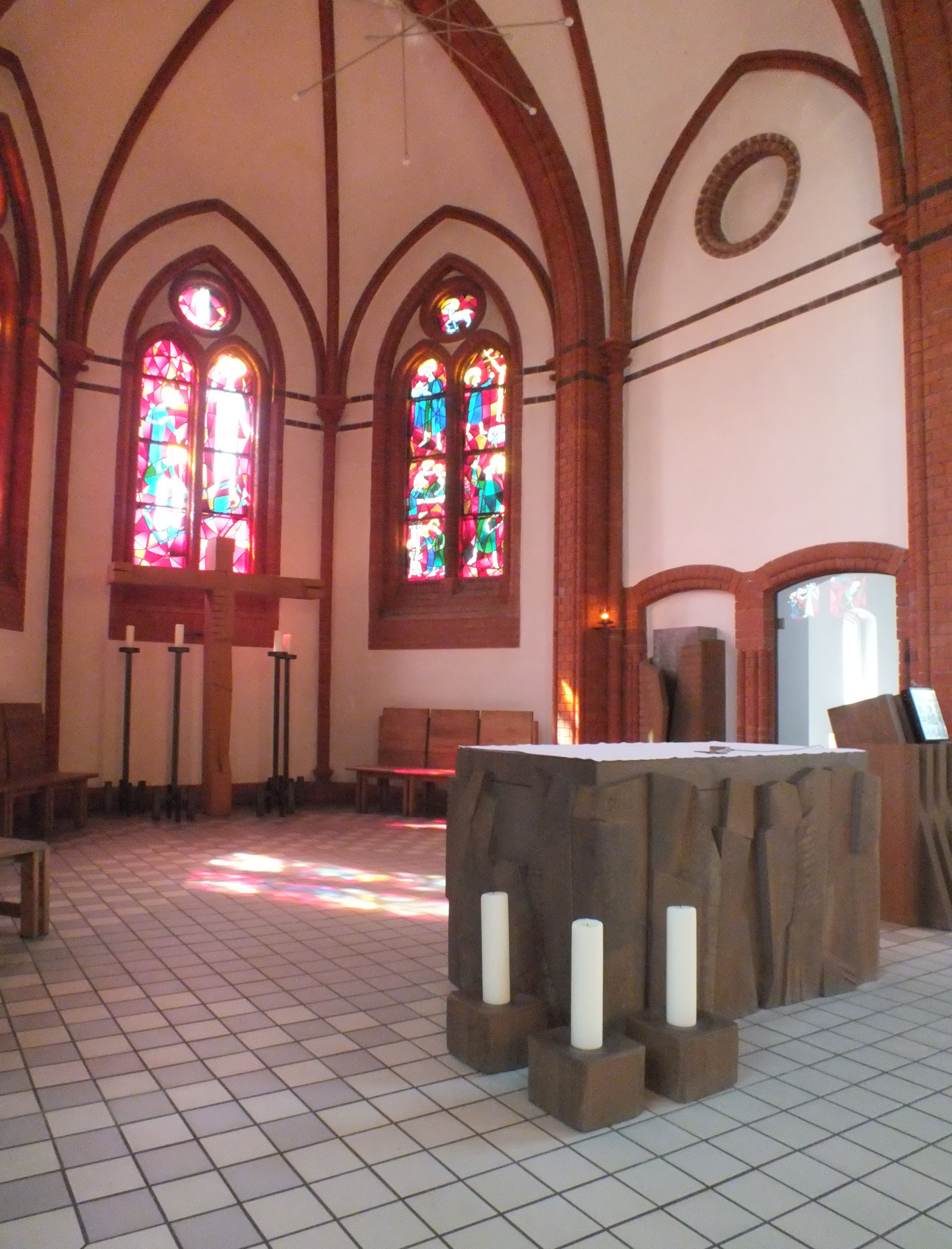 Berlin-Köpenick, Lindenstraße: Kathol. Kirche St. Josef; Altarraum mit Altar, Ambo, Leuchtern